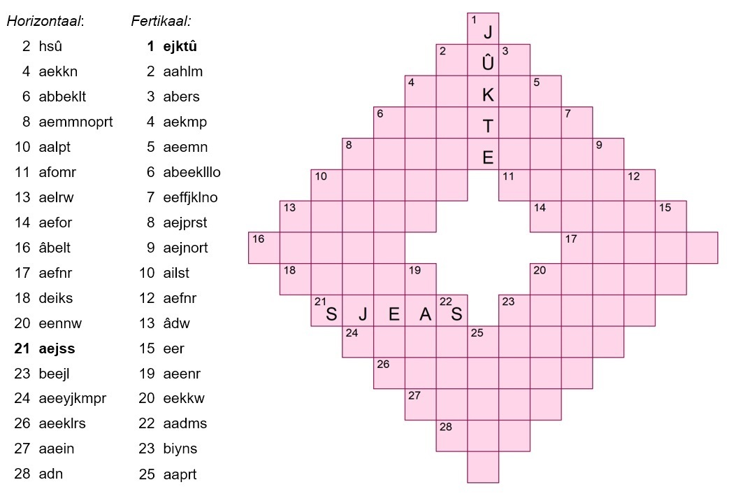 Anagrampuzzel waarin twee anagrammen reeds zijn ingevuld